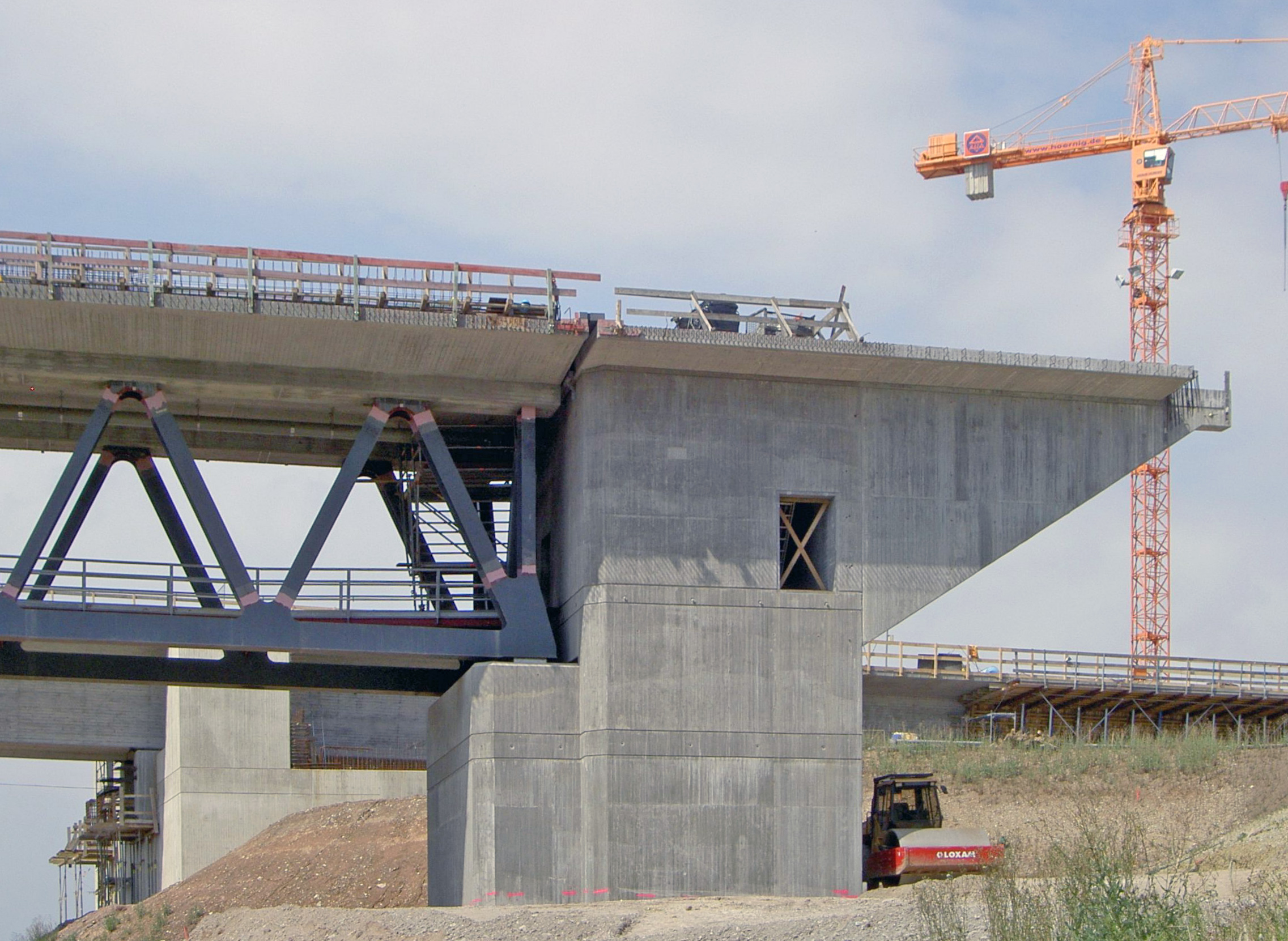 Widerlager Nord der NBS-Brücke über das Itztal bei Coburg